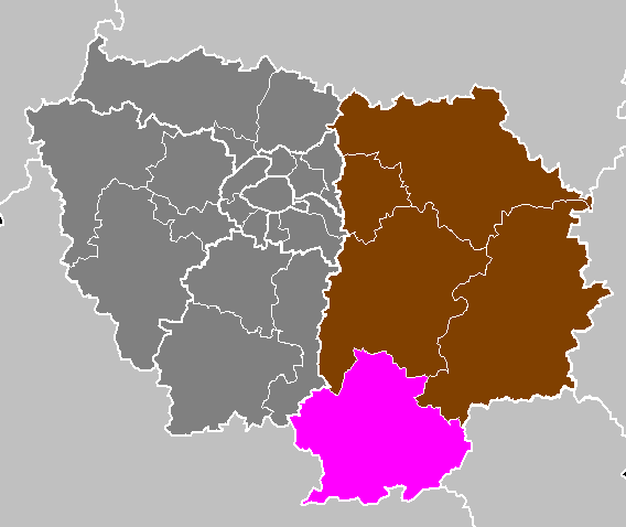 Maps of arrondissements and cantons of France: Département de Seine-et-Marne - Arrondissement de Fontainebleau.PNG (Région Île-de-France)